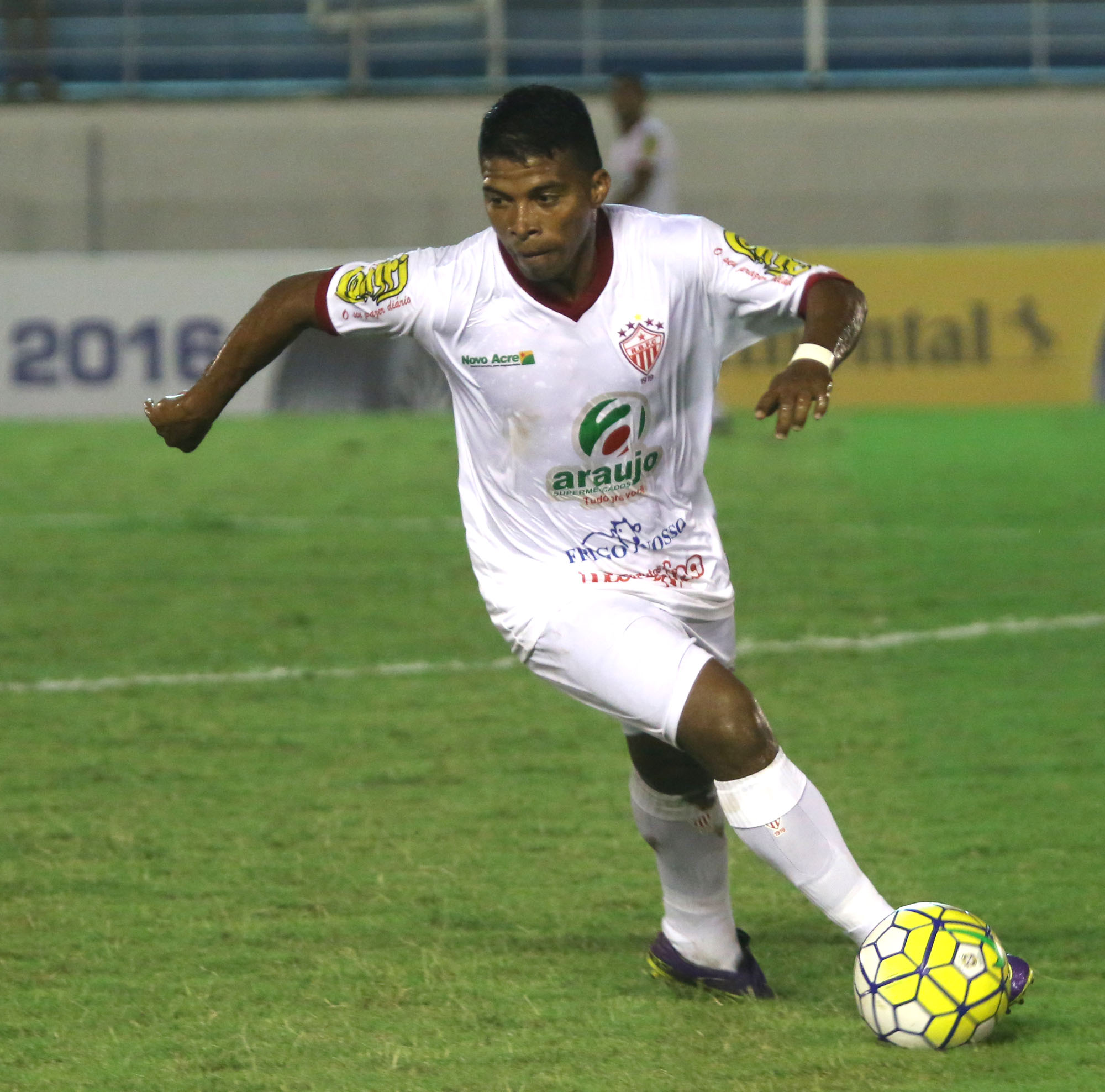 Foto: Sérgio Vale/Secom